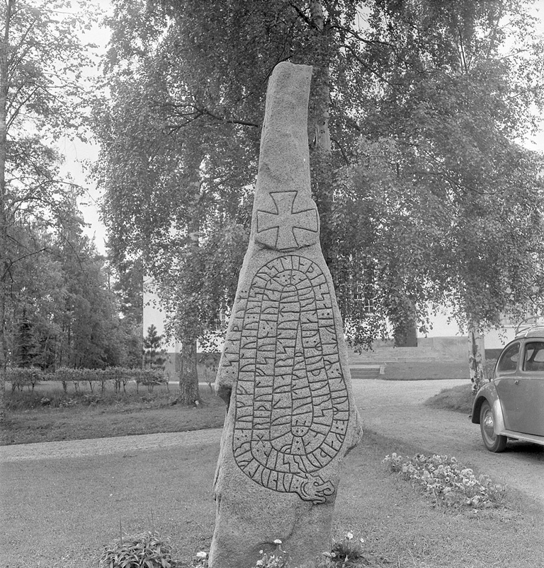 Inskriften lyder: Unnulv och Fjolvar reste denna sten efter Djure, sin fader, Redulvs son, och efter harlau, sin moder, Fjolvars dotter på Viksta. Motiv: Hs6 Järvsö Nyckelord: Runor Kategori: Runristning/runsten Inskriften lyder: Unnulv och Fjolvar reste denna sten efter Djure, sin fader, Redulvs son, och efter harlau, sin moder, Fjolvars dotter på Viksta.